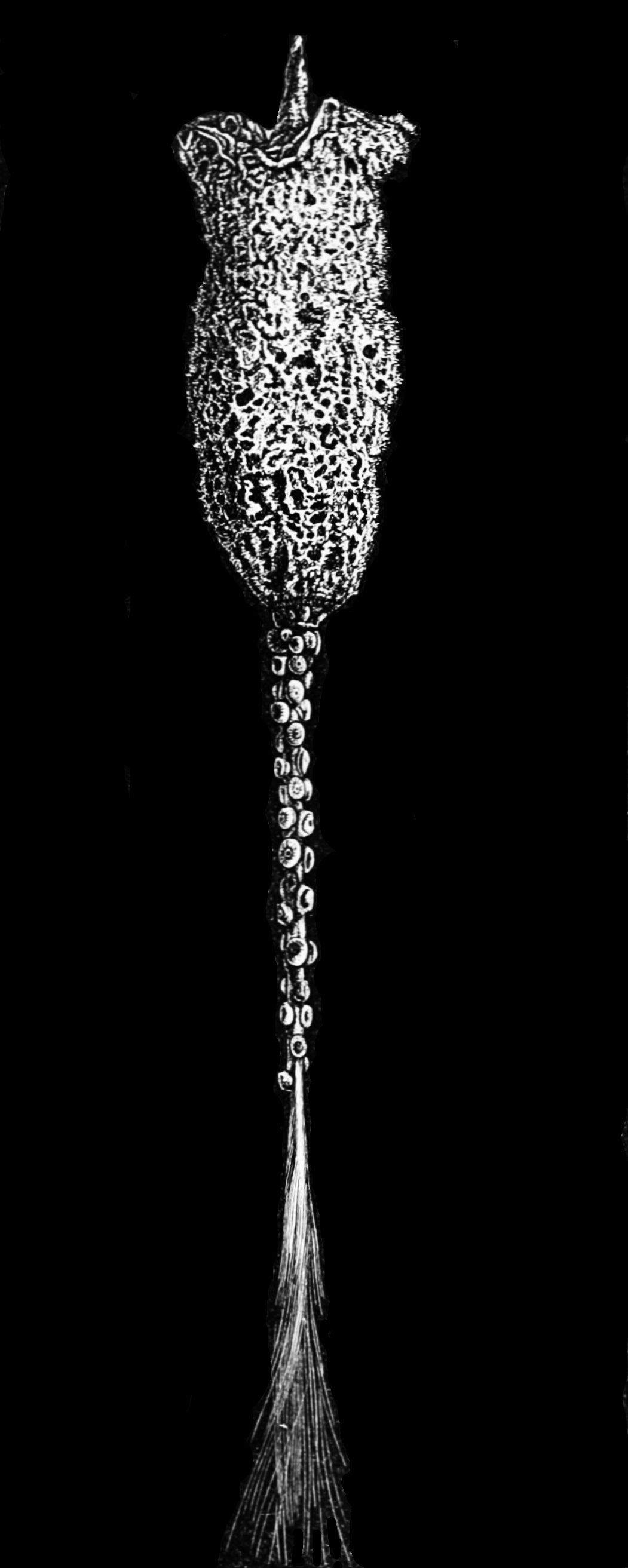 Glass-rope Sponge Hyalonema lusitanicum